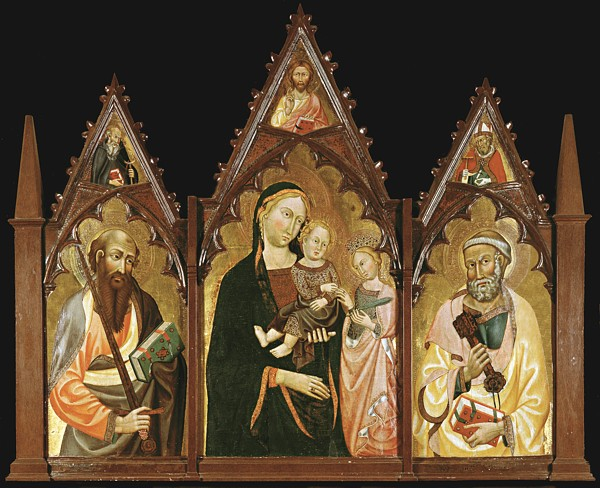 Triptyque, au centre: Mariage mystique de sainte Cathérine,sur les côtés saint Paul (à gauche) et saint Pierre (à droite).